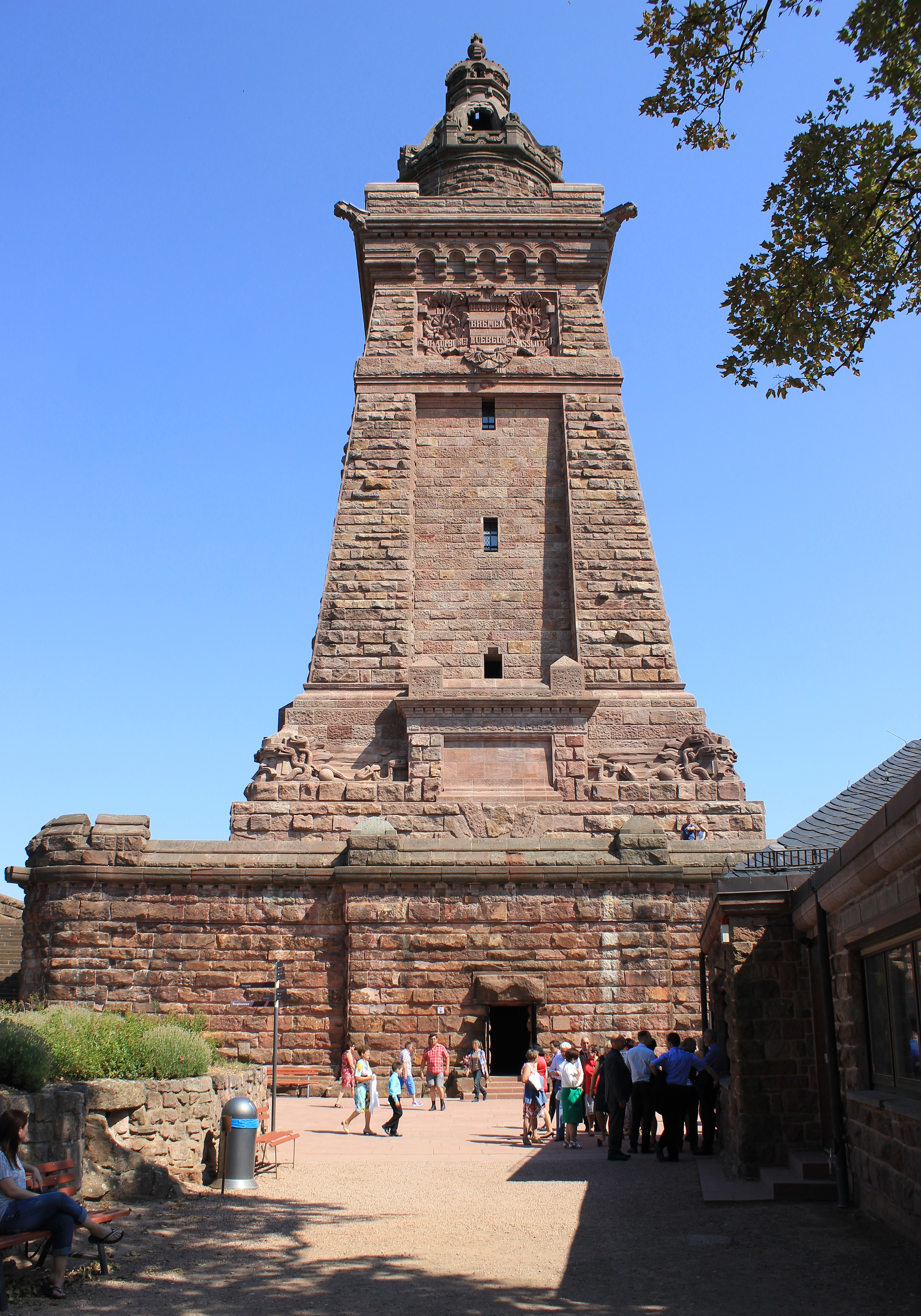 Kyffhäuserdenkmal in Sachsen. Kyffhäuser.